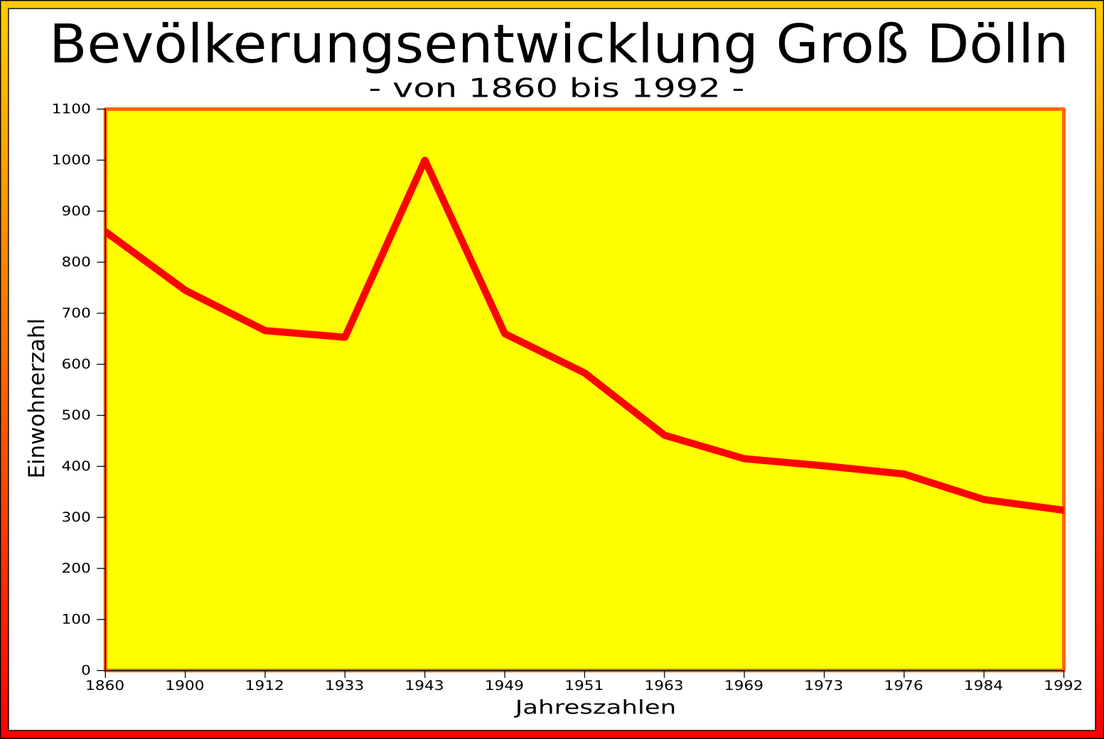 Diagramm der Bevölkerungsentwicklung Groß Döllns von 1860 bis 1992